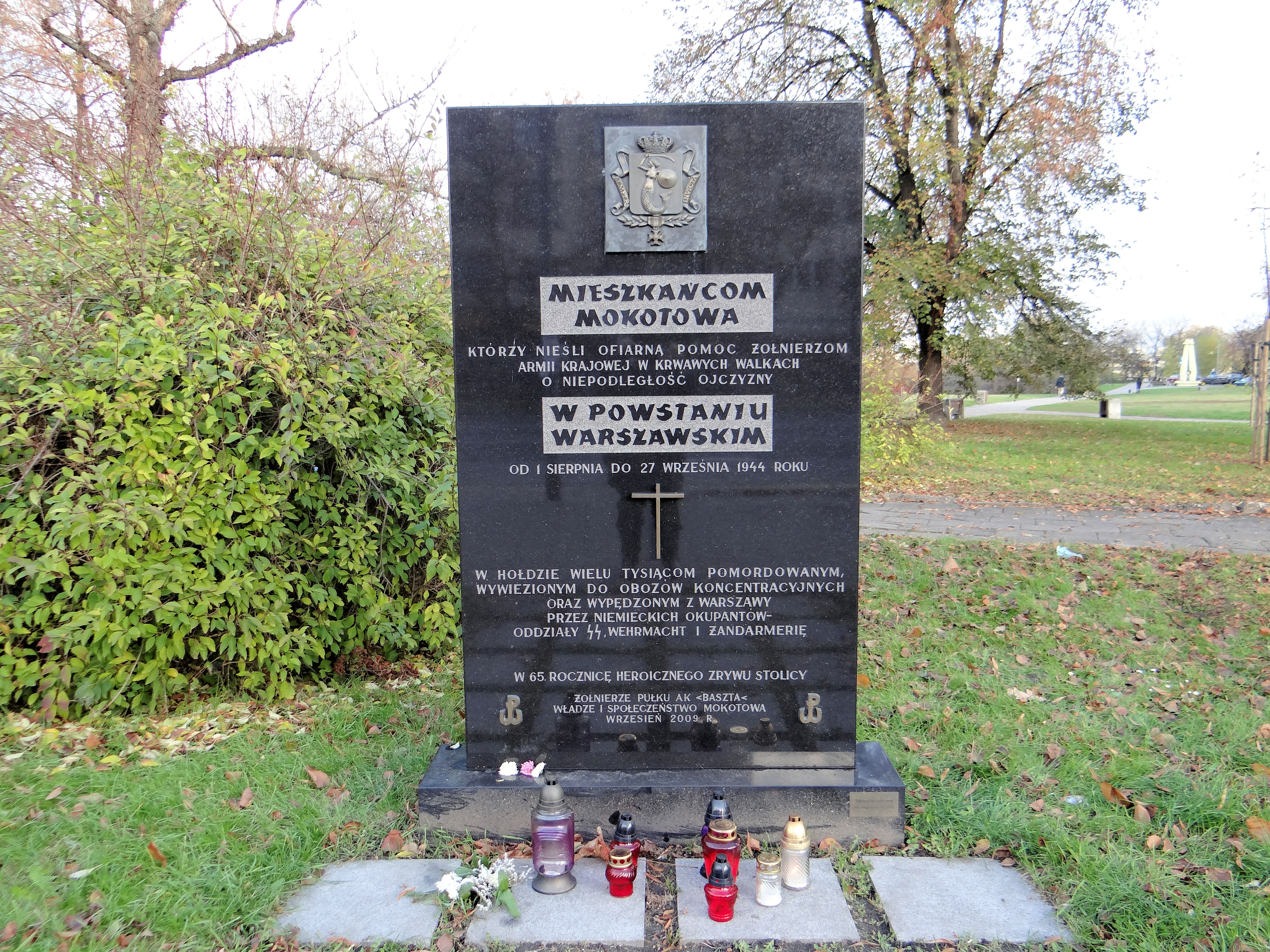 Miejsce Pamięci Narodowej przy ulicy Puławskiej nieopodal Dworkowej upamietniające Mieszkańców Mokotowa niosących pomoc Powstańcom Warszawskim i tysiącom pomordowanych i prześladowanych przez hitlerowskich najeźdzców - w 65 rocznicę Powstania Warszawskiego